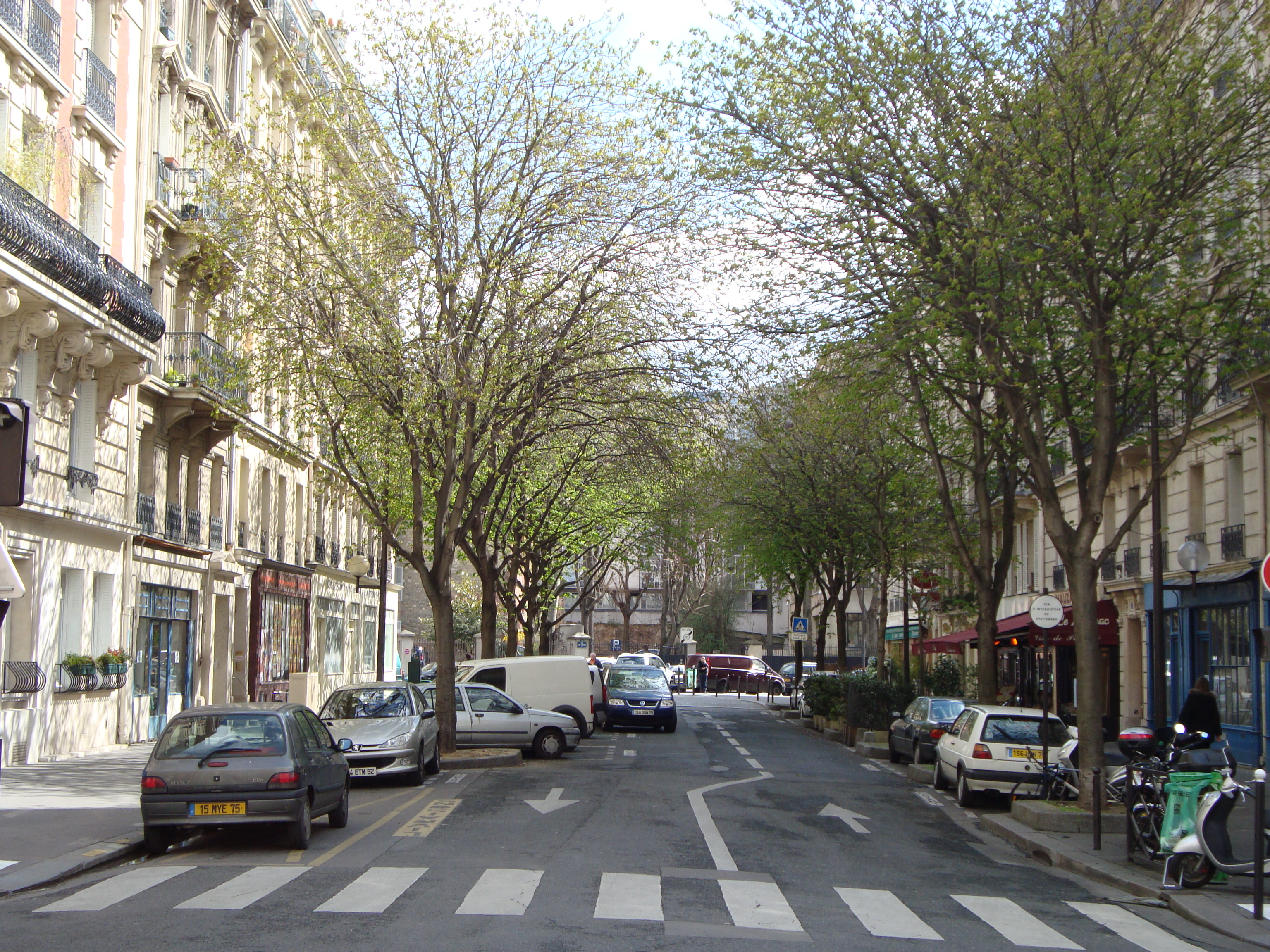 Rue de l'Abbé de l'Epée dans sa partie est